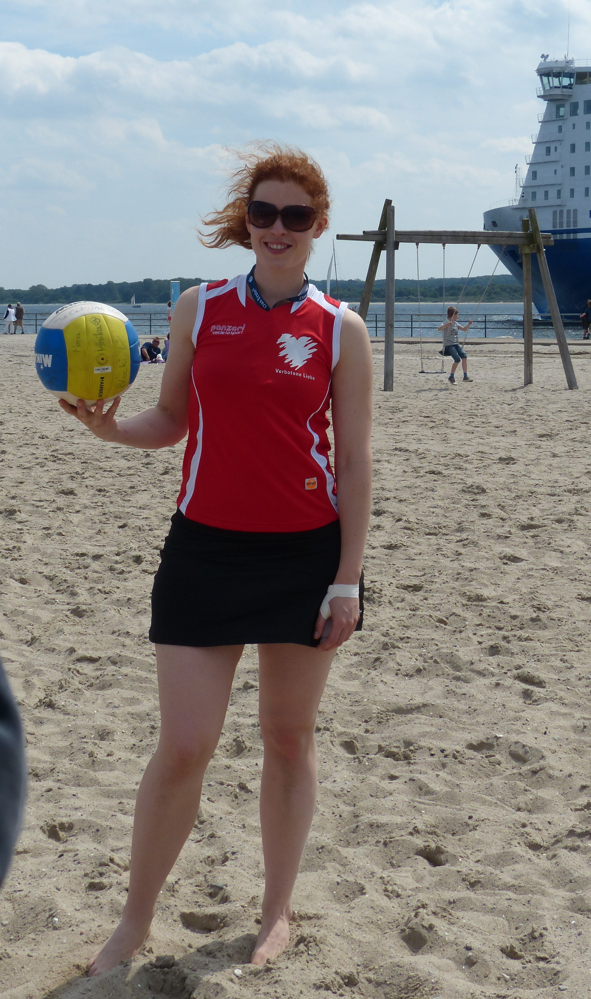 Janina Isabell Batoly beim Fotoshooting zum Beachvolleyball-Starcup 2013